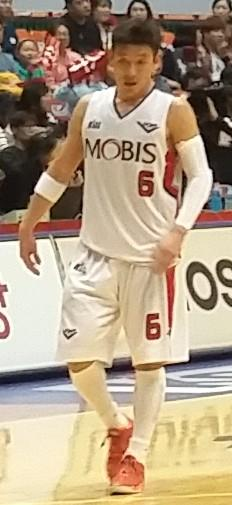 부산 KT 소닉붐 대 울산 모비스 피버스, 사직실내체육관